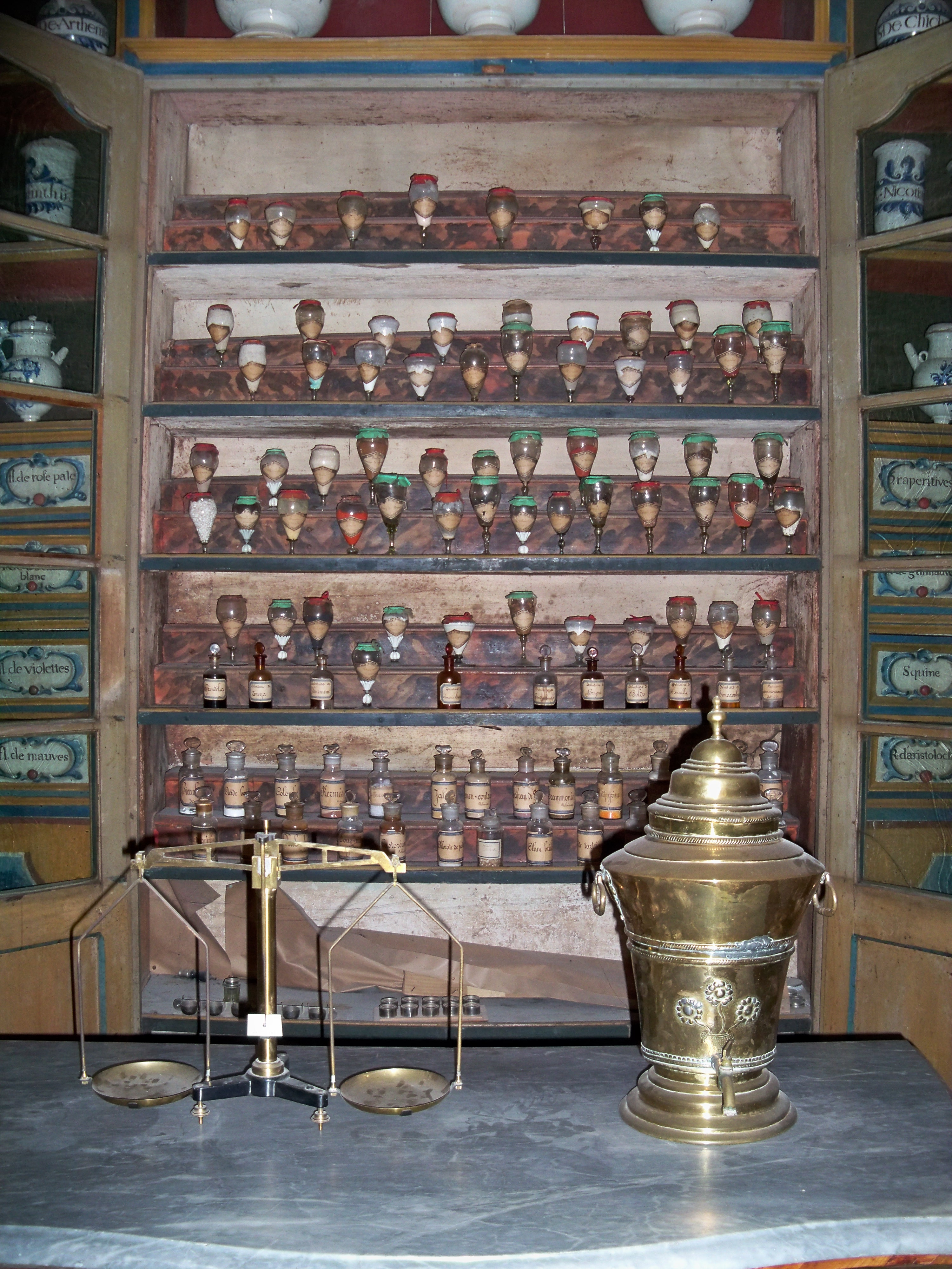 Hotel Dieu de Carpentras (84) .